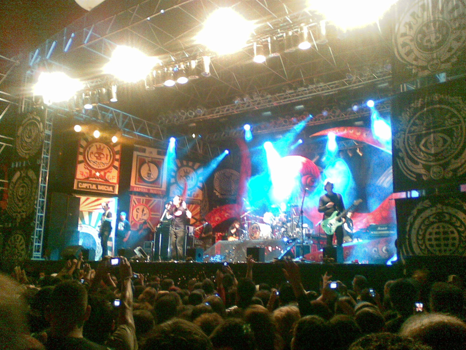 Show do Capital Inicial em Mogi das Cruzes no dia 12/11/2008.